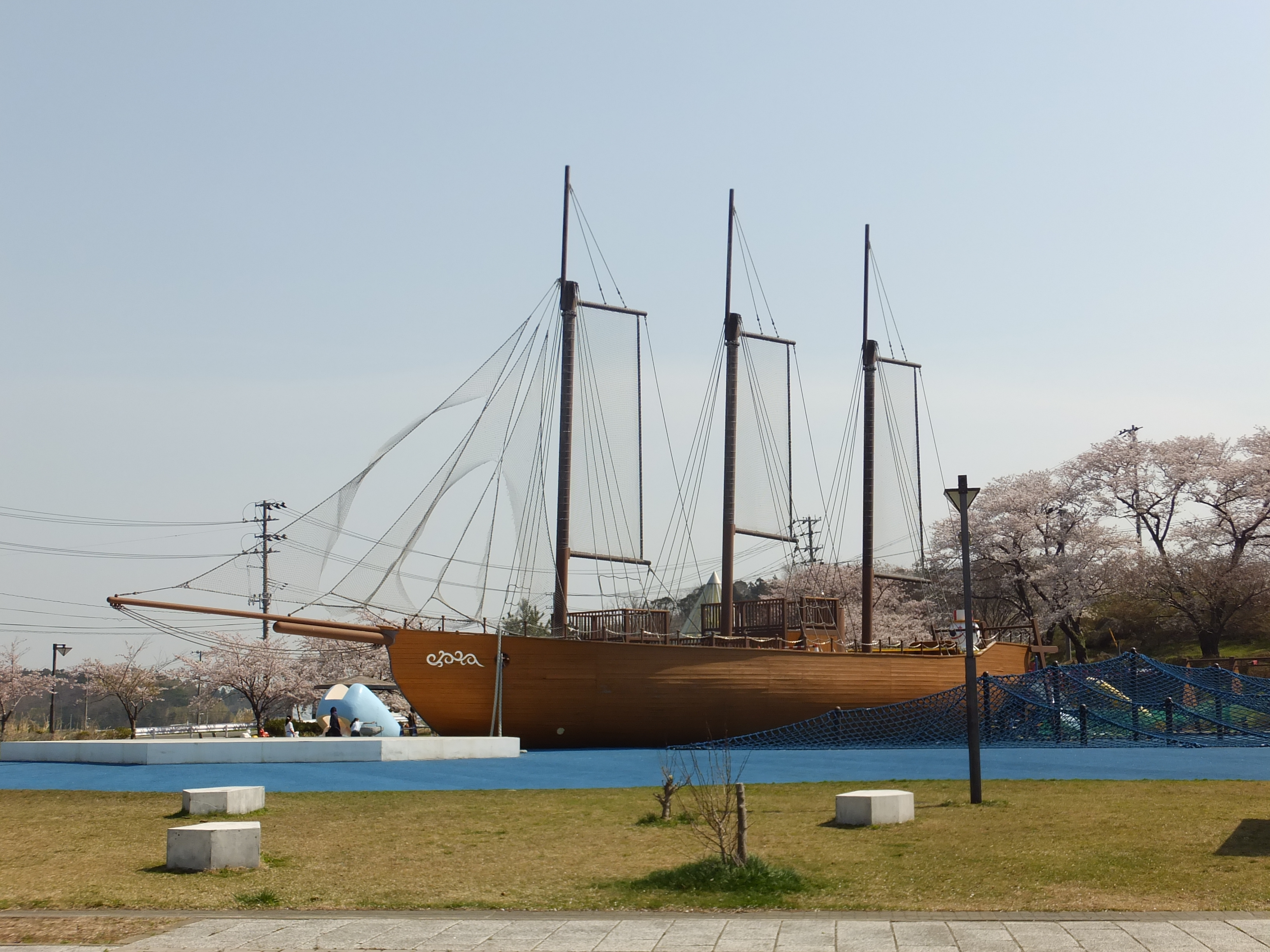 白瀬南極探検隊記念館前にて、「開南丸」レプリカ